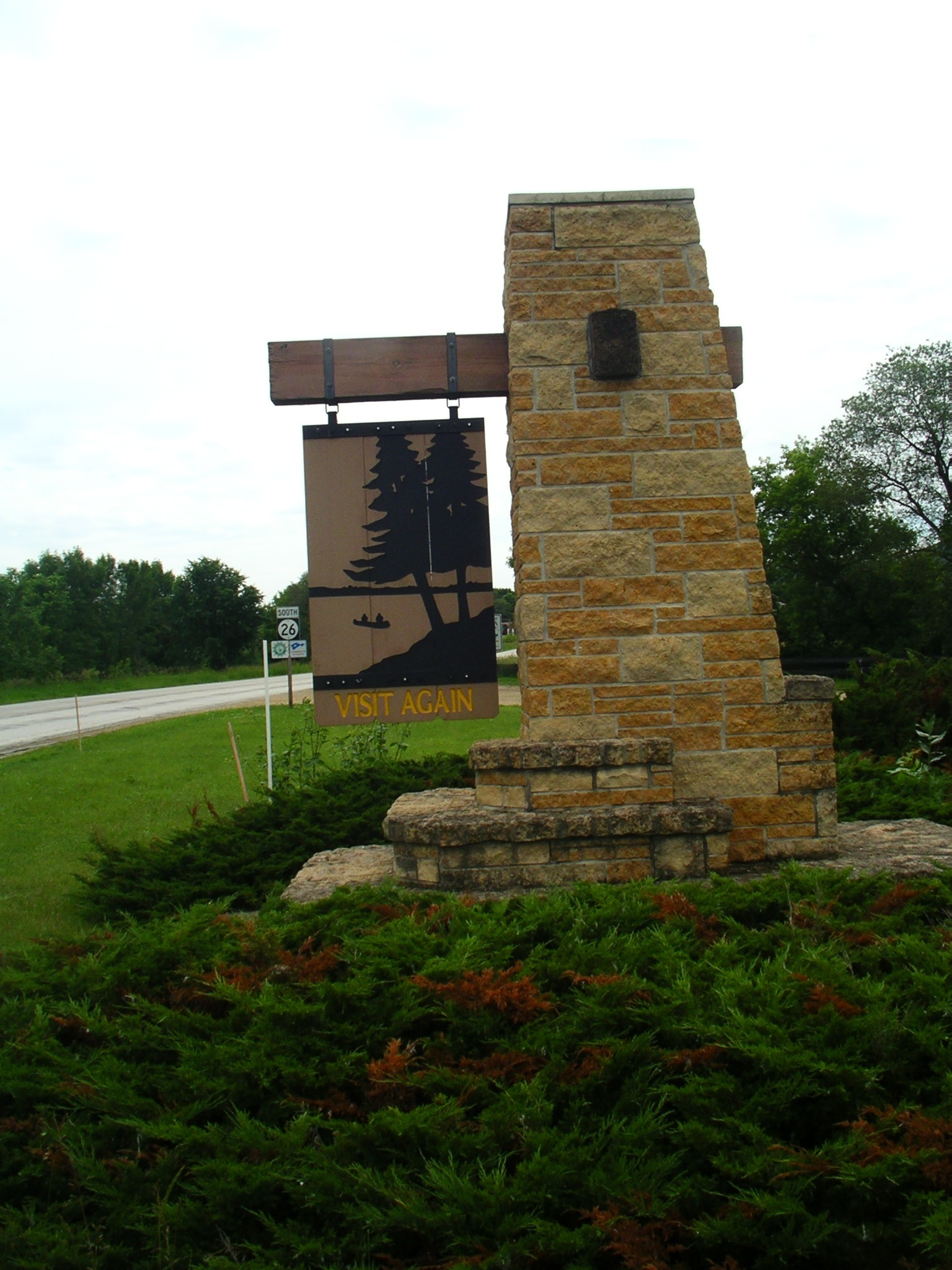 Ortsrand von New Albin, Iowa von Minnesota kommend